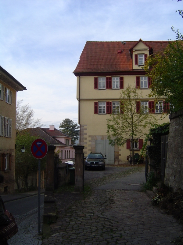 Ehemalige Münze in der Neckarhalde, unterhalb des Schlosses Hohentübingen